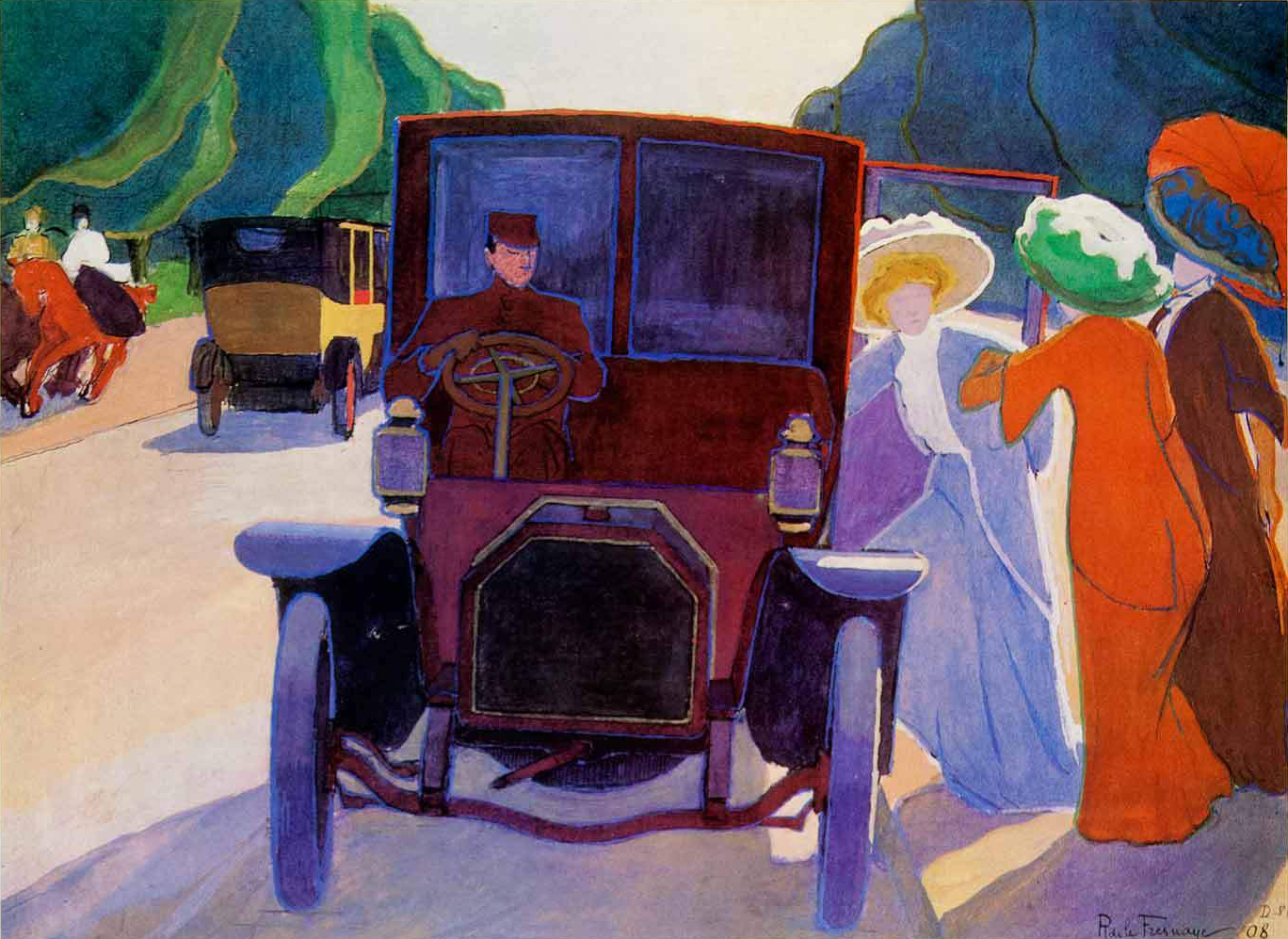 La Avenida de las Acacias en el Bois de Boulogne (1905), de Roger de La Fresnaye, Museo Carnavalet, París.